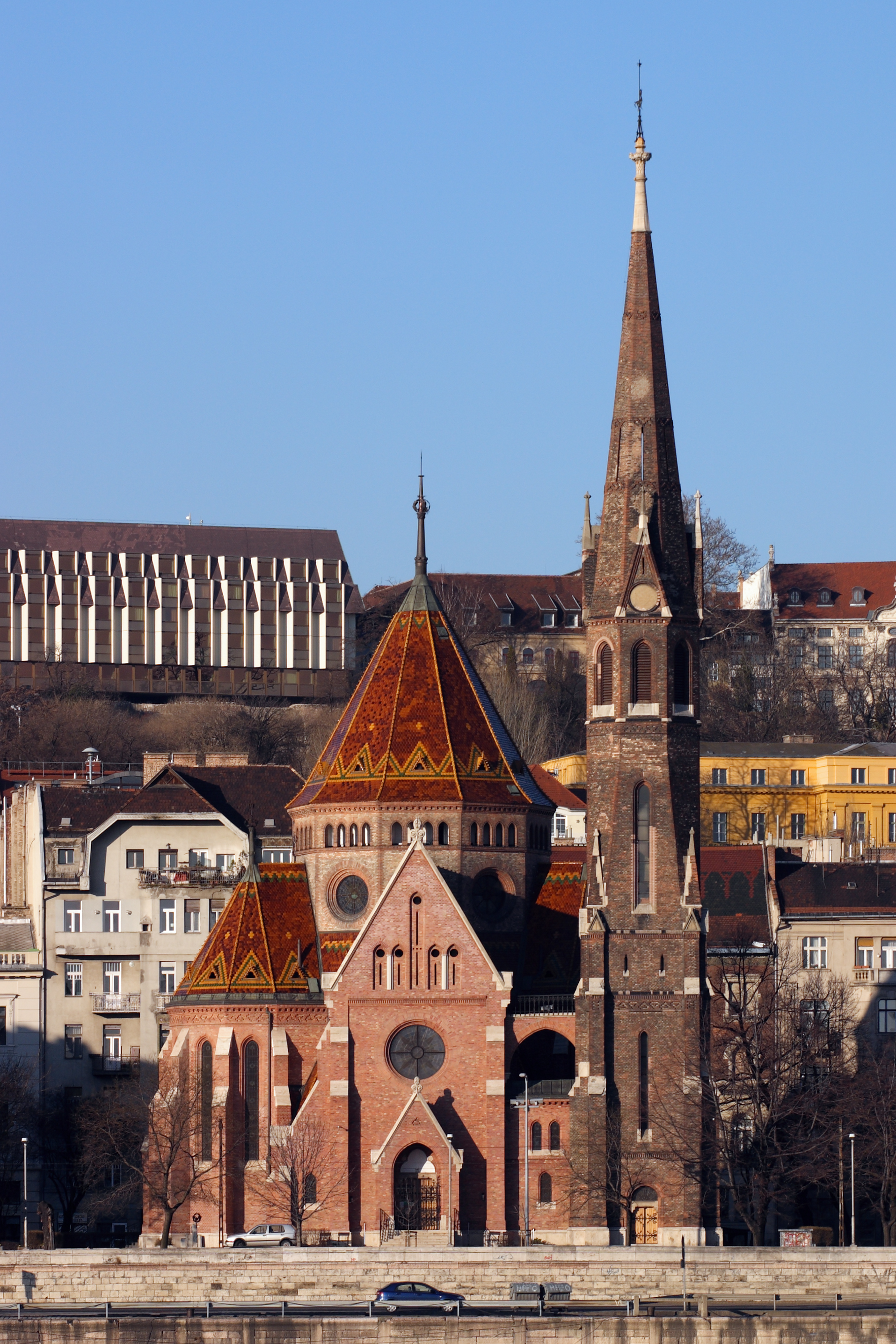 Református templom (Budapest 1, Szilágyi Dezső tér) This is a photo of a monument in Hungary. Identifier: 66